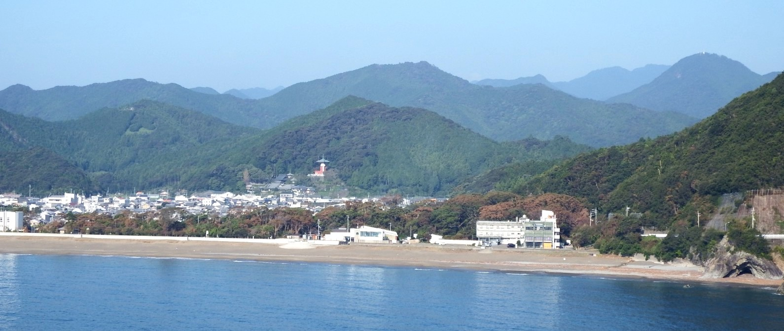 えびす洞から見る